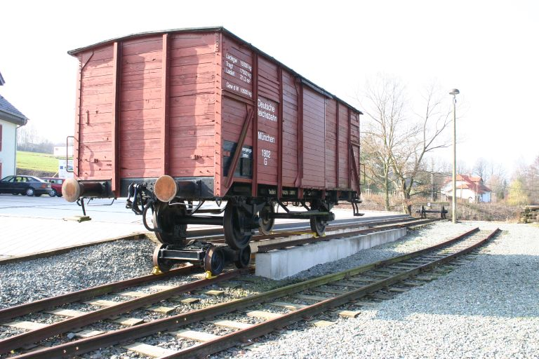 Rollbockumsetzanlage der Rollbockbahn in Oberheinsdorf